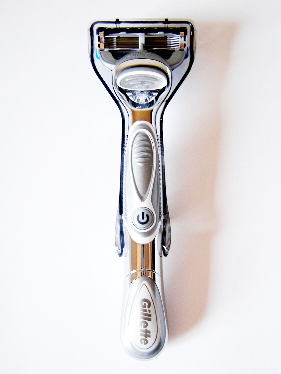 Rasoio Gillette Fusion Proglide Power Silvertouch